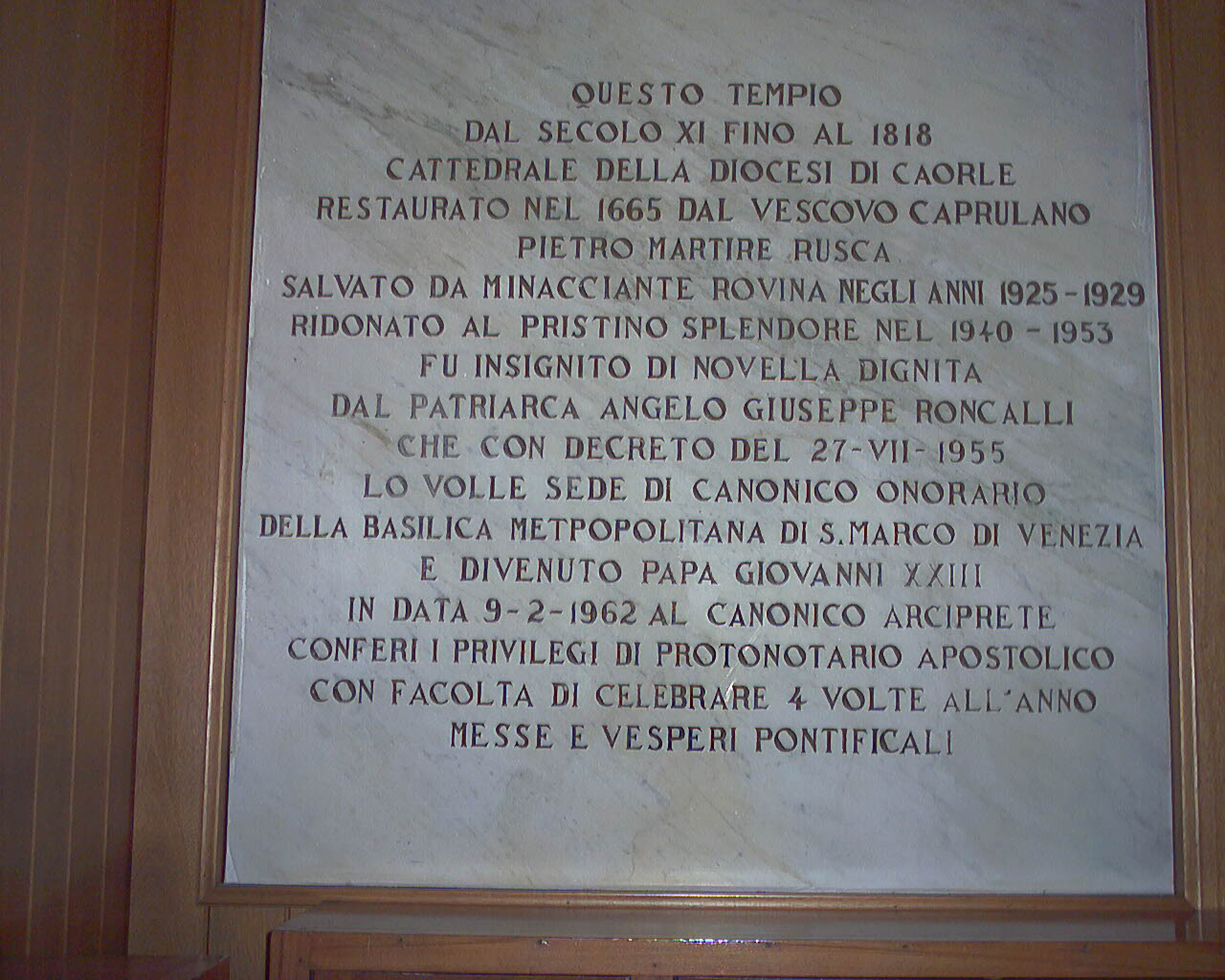 Autore: l'ho scattata io stamani Descrizione: lapide commemorativa del privilegio concesso da Sua Santità Giovanni XXIII all'arciprete pro-tempore di Caorle